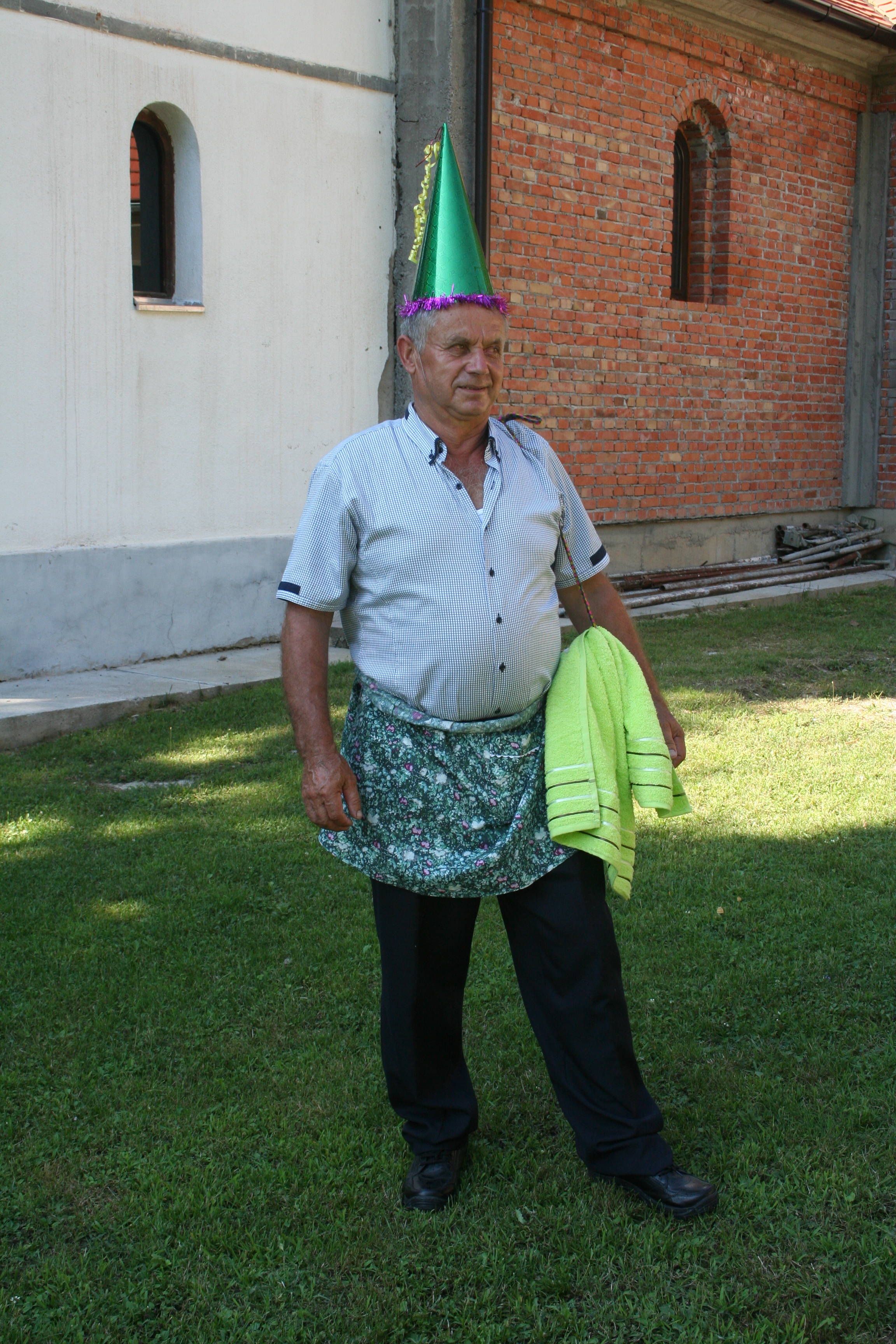 Venčanje u crkvi. Crkva Usekovanja glave Sv. Jovana Krstitelja, Dvorska